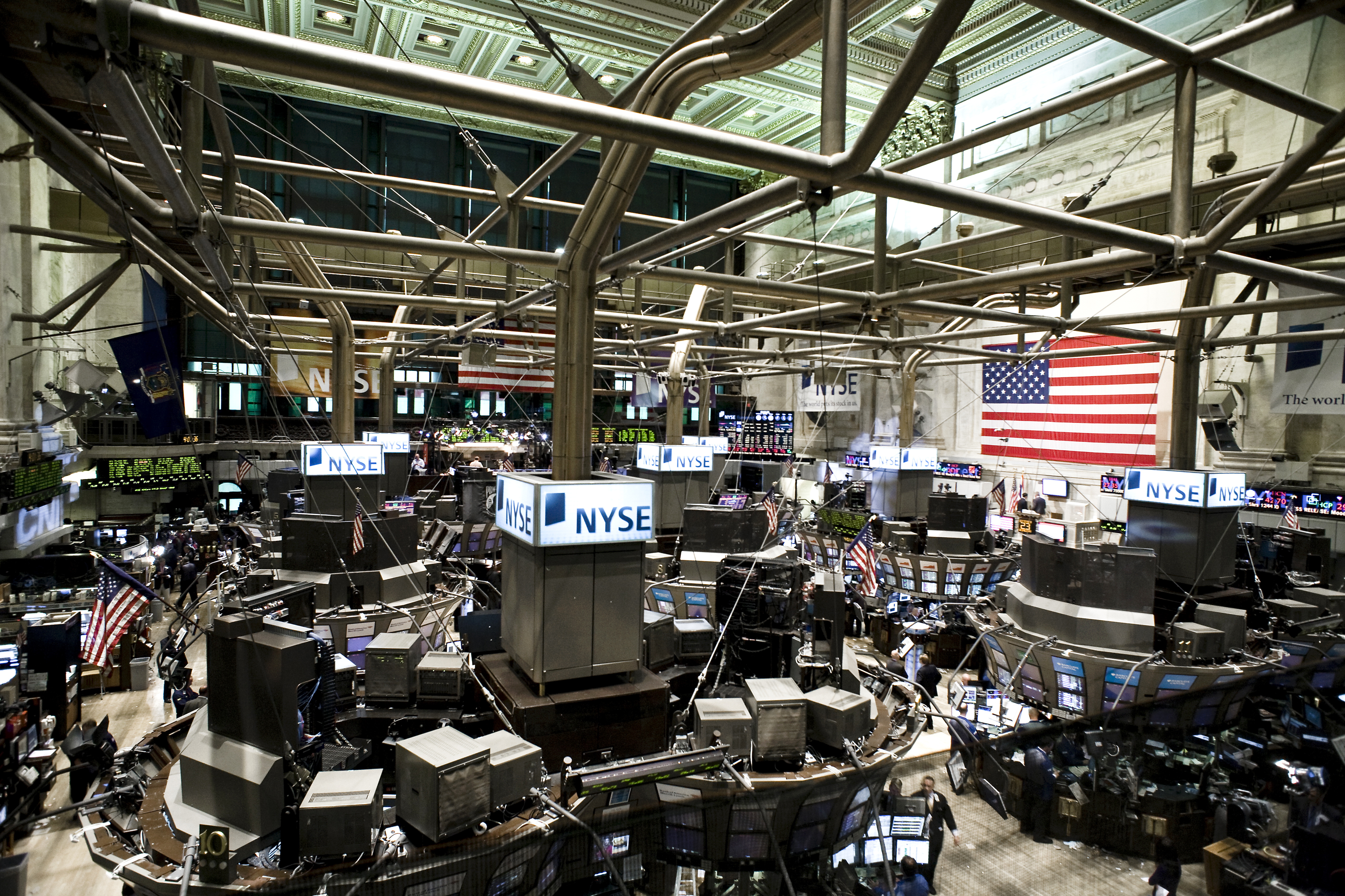 NYSE นายกรัฐมนตรี เข้าร่วมการประชุมสมัชชาสหประชาชาติ สมัยสามัญ ครั้งที่ 64 และการประชุม Pittsburgh Summit ณ นครนิวยอร์ก สหรัฐอเมริกา วันที่ 23กันยายน 2552 (The Official Site of The Prime Minister of Thailand Photo by พีรพัฒน์ วิมลรังครัตน์)